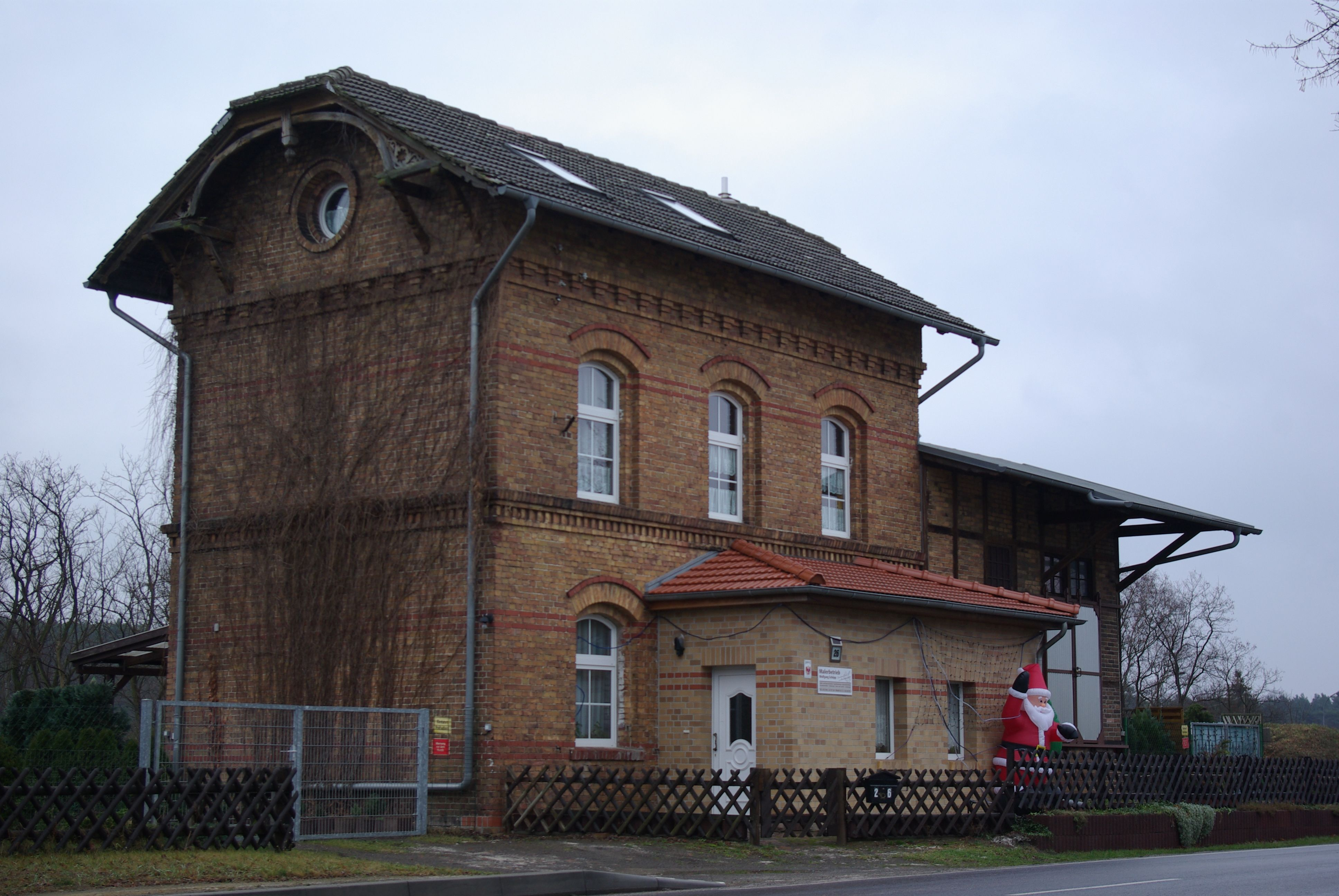 Mittenwalde Ortsteil Gallun. Der Bahnhof Gallun Süd steht unter Denkmalschutz. Der Bahnhof ist nicht mehr in Betrieb.